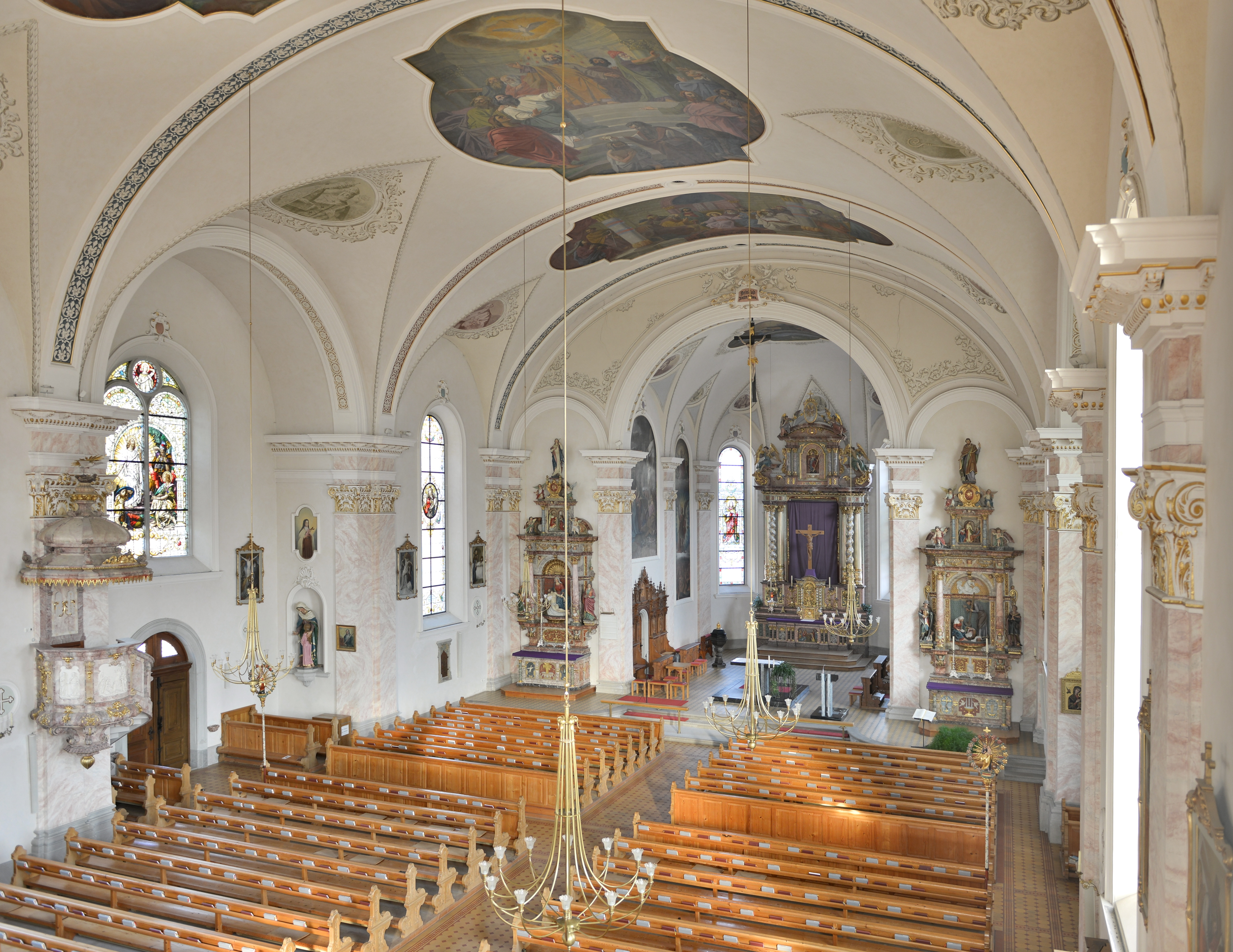 Pfarrkirche St.Jodok 1907/08 in Bezau